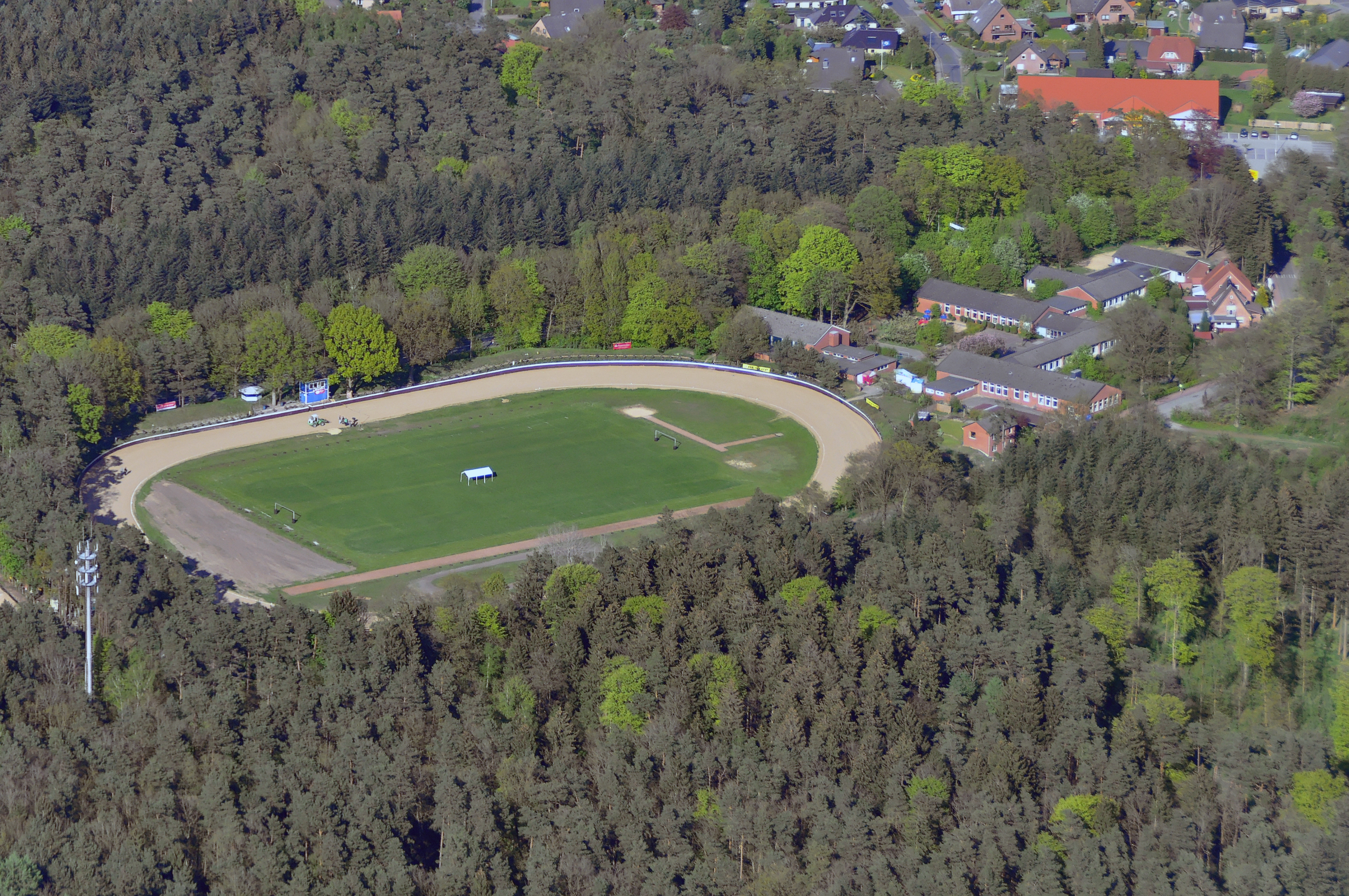 Luftbilder von der Nordseeküste 2012-05